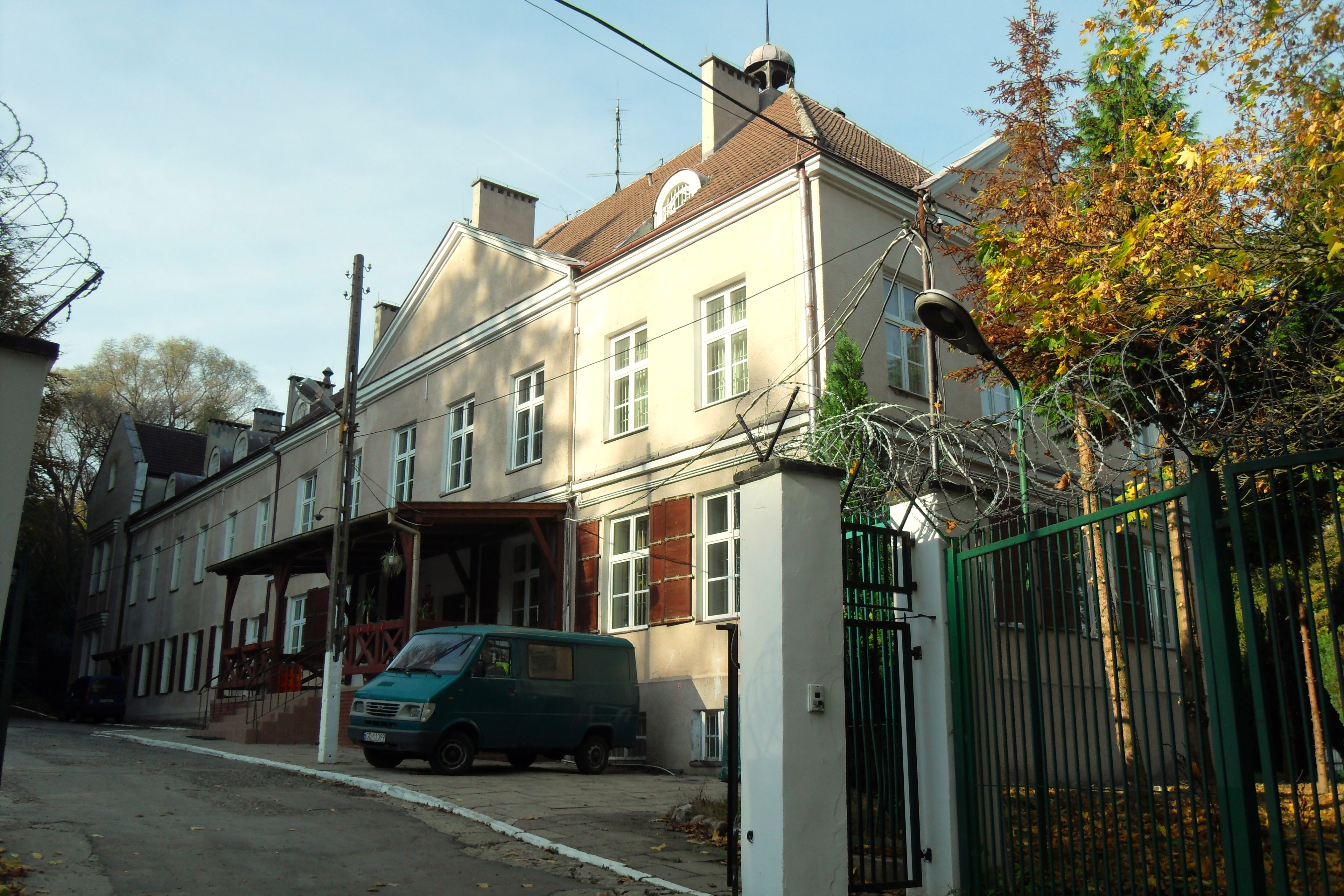 "III Dwór" (budynek północny), Gdańsk Oliwa.